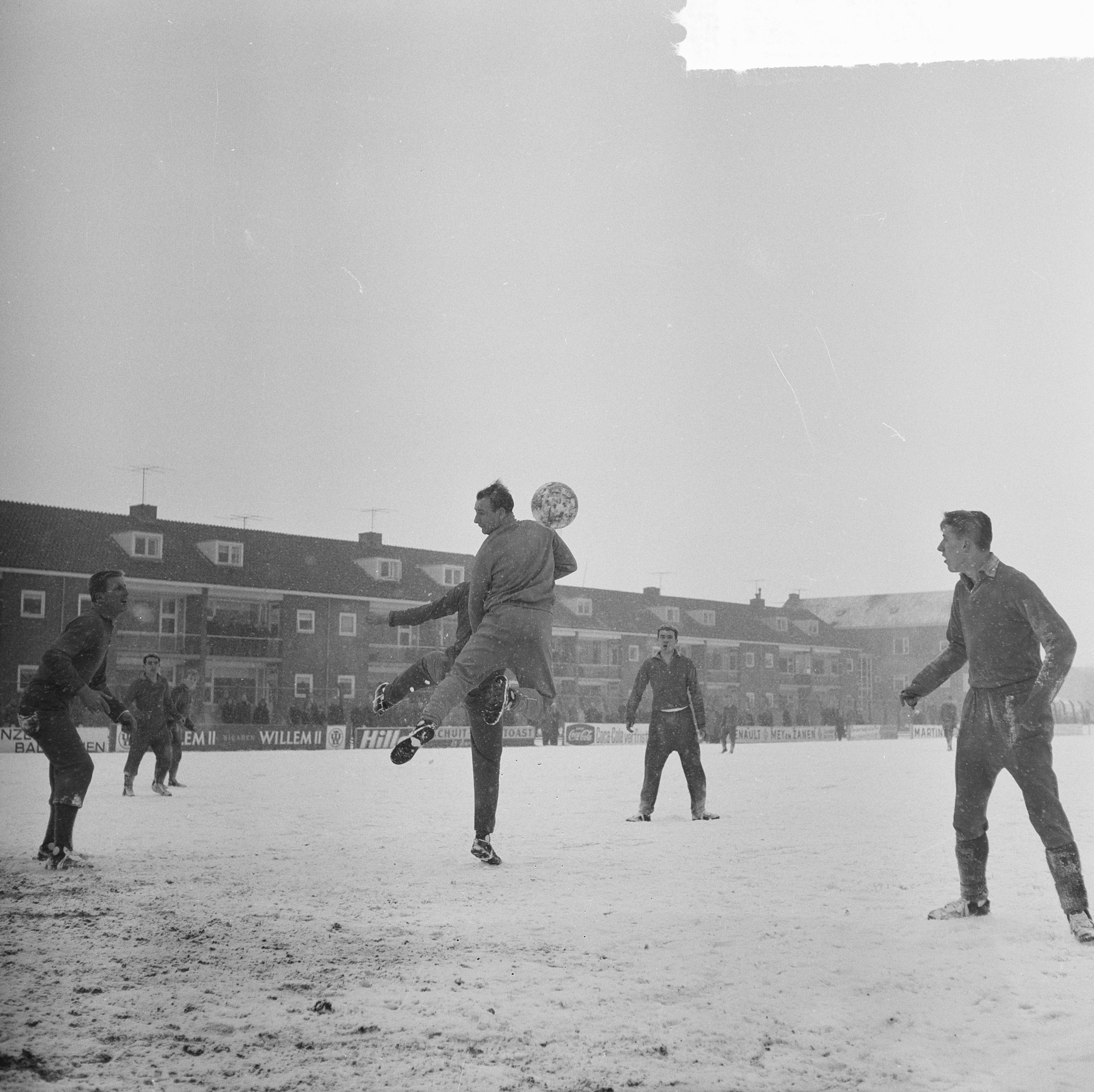 Collectie / Archief : Fotocollectie Anefo Reportage / Serie : [ onbekend ] Beschrijving : KFC tegen DWS Datum : 3 februari 1963 Trefwoorden : sport, voetbal Persoonsnaam : KFC Fotograaf : Nijs, Jac. de / Anefo Auteursrechthebbende : Nationaal Archief Materiaalsoort : Negatief (zwart/wit) Nummer archiefinventaris : bekijk toegang 2.24.01.03 Bestanddeelnummer : 914-7839